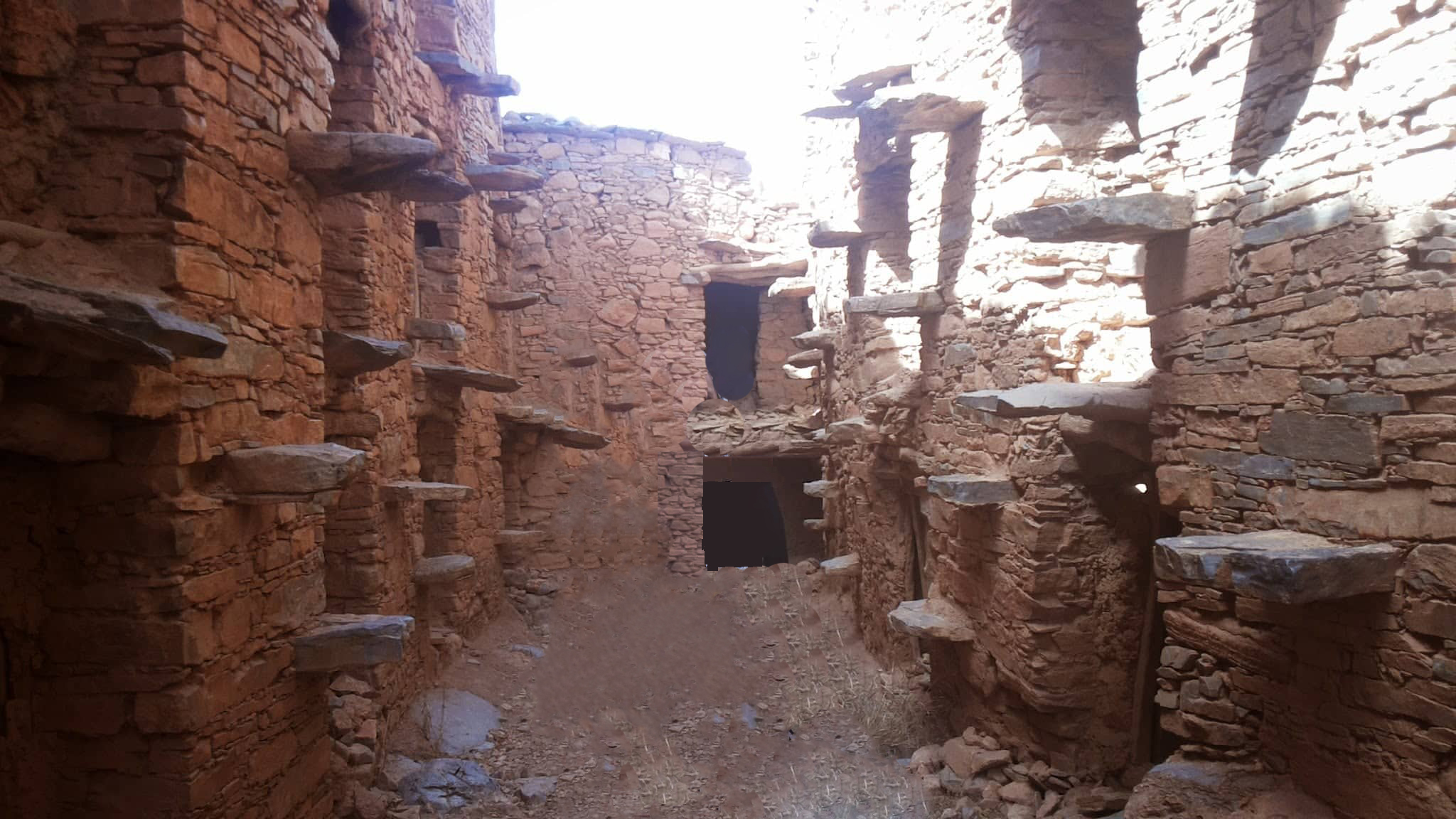 صورة توضح الحجرات و السلالم الحجرية المؤدية إليها